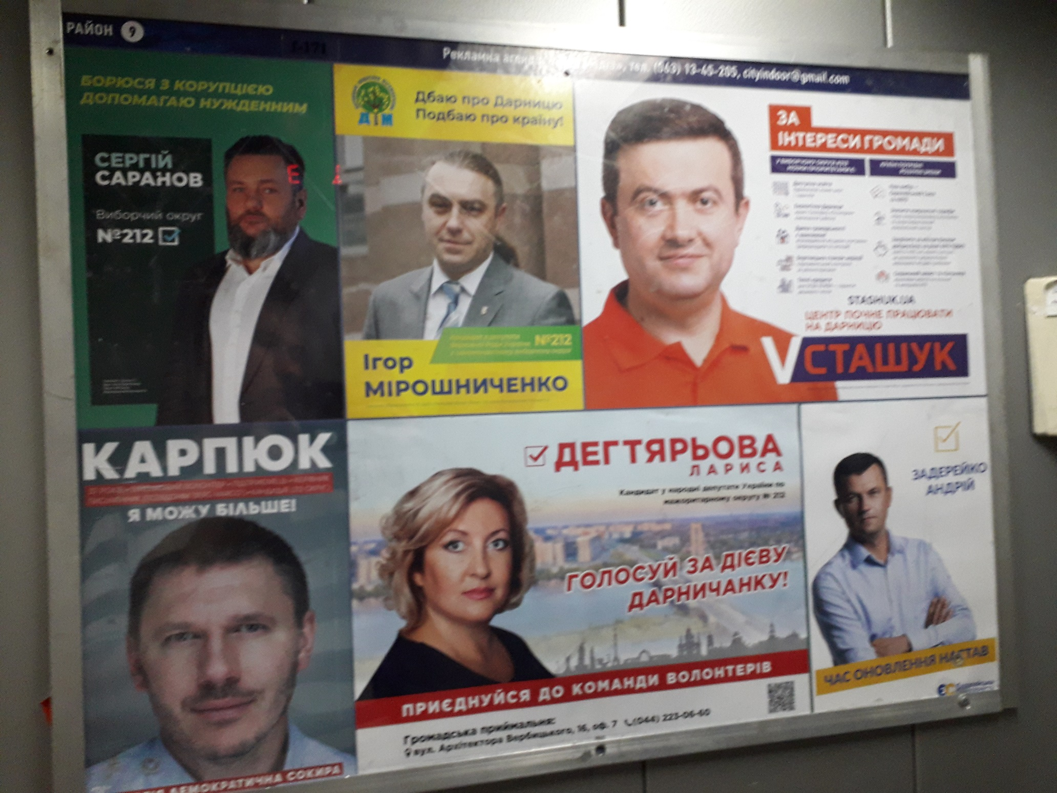 Приклади передвиборчої агітації від деяких кандидатів, парламентські вибори 2019 року, 212 округ.